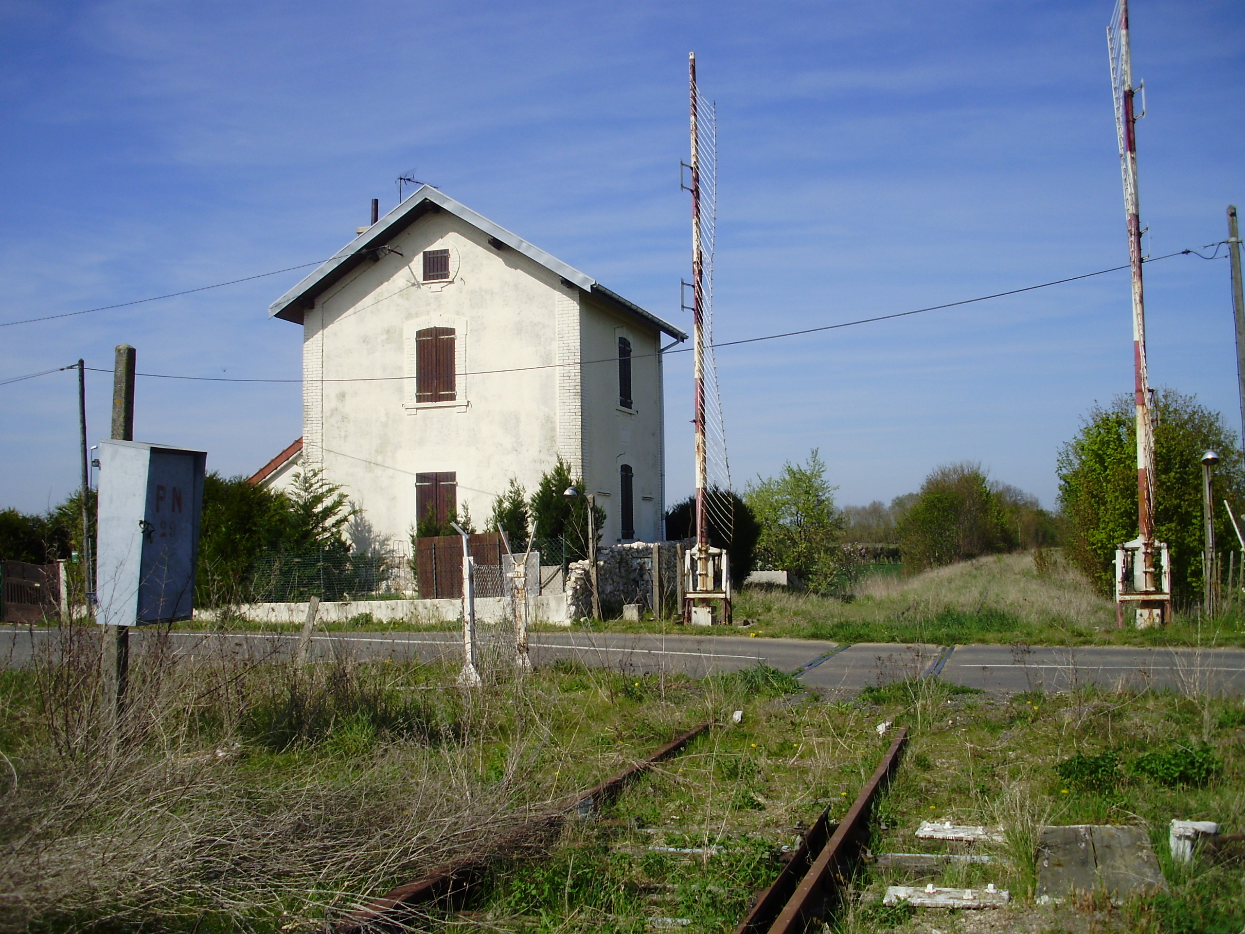 Gare de Villiers-Saint-Georges, Seine-et-Marne, France (passage à niveau n° 29 à 500 m environ au nord de la gare, au croisement avec la route départementale D 60)